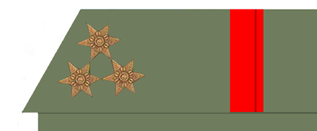 Hauptmann des k.u.k. Artilleriestabes mit den Distinktionsabzeichen gem Verordnung von 1916 auf der graugrünen Feldbluse